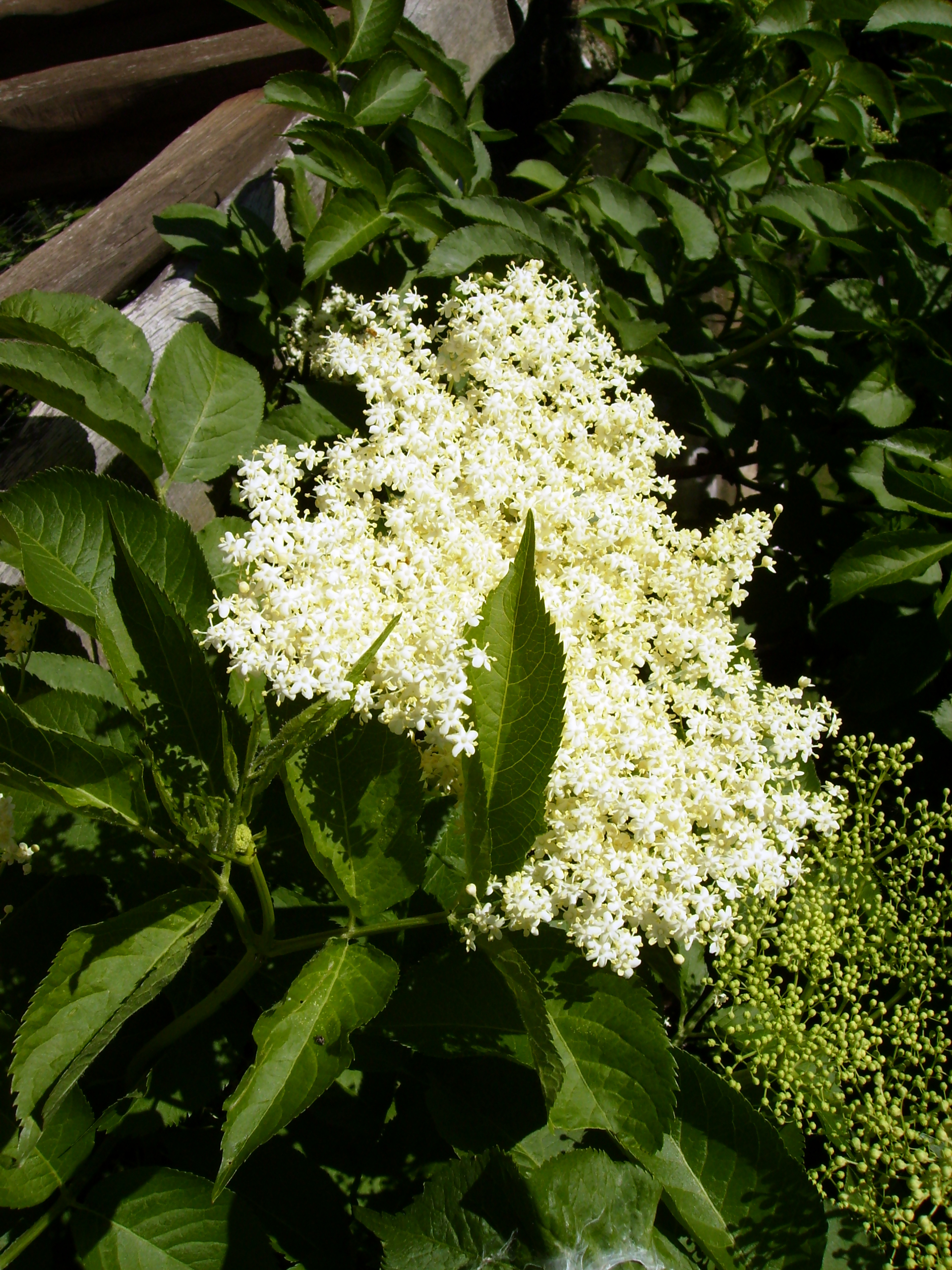 Černý bez - květ.